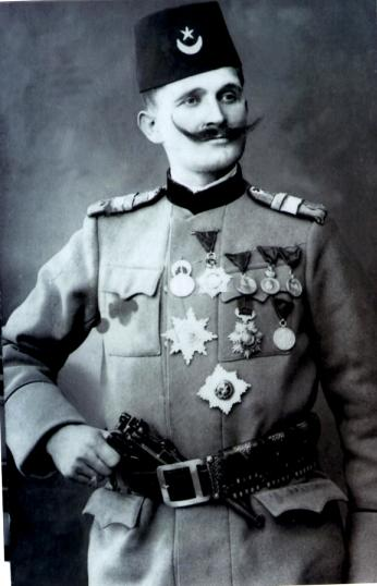 Jusuf mehoniqi, kaçak i Sanxhakut